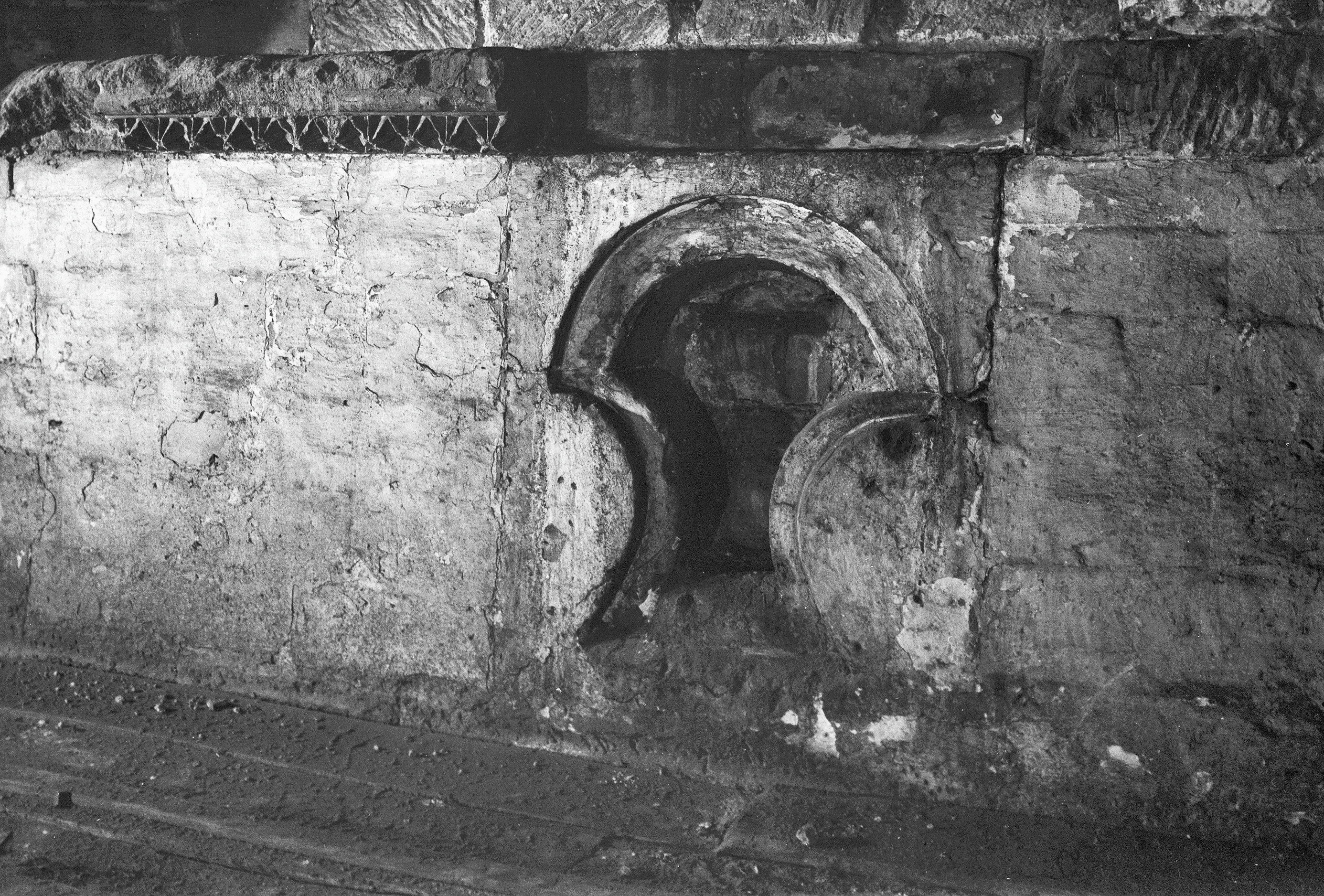 Sint-Servaaskerk: "sleutelgat"-venster op zolder westelijke kruisgang